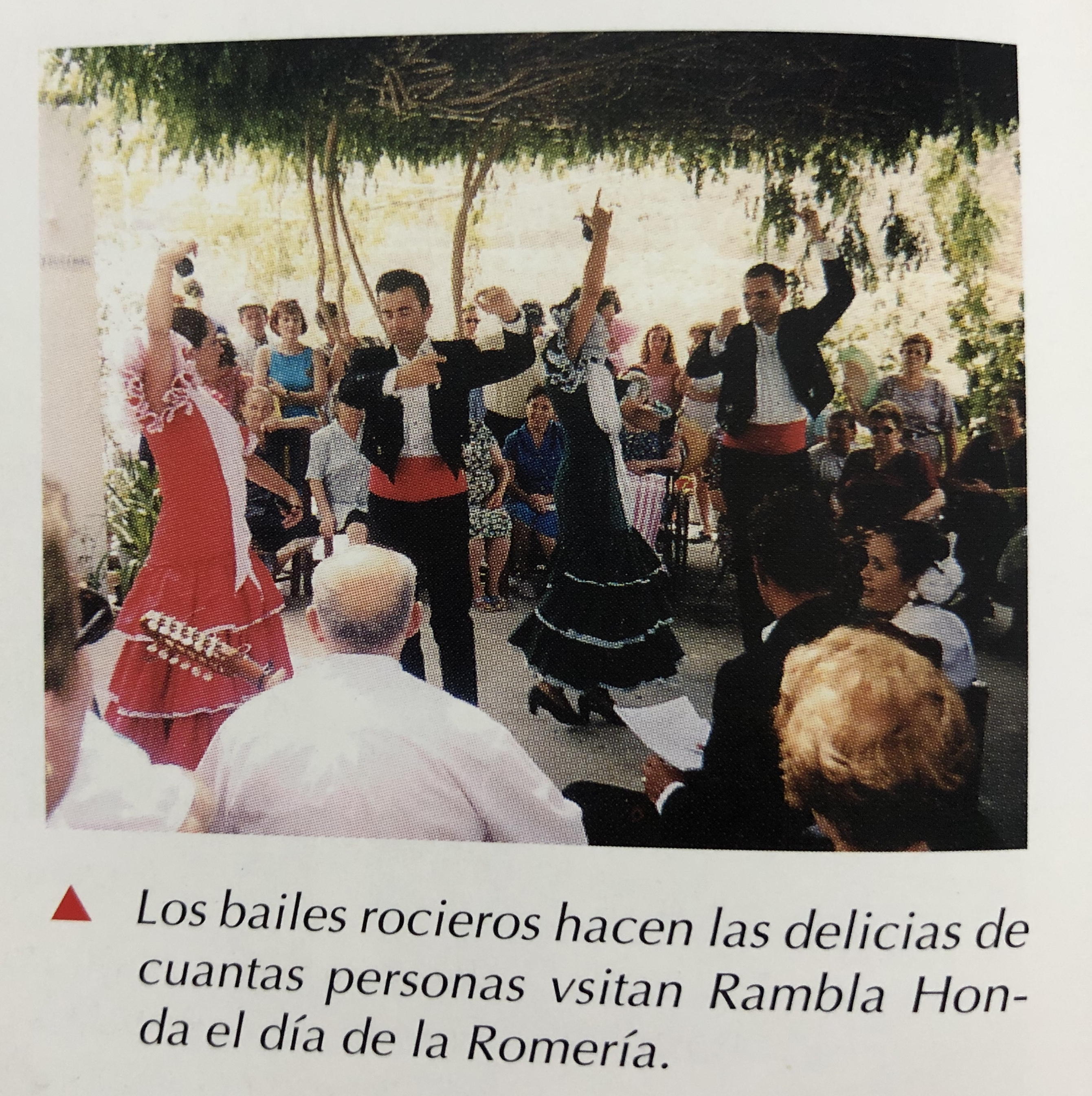 Romería